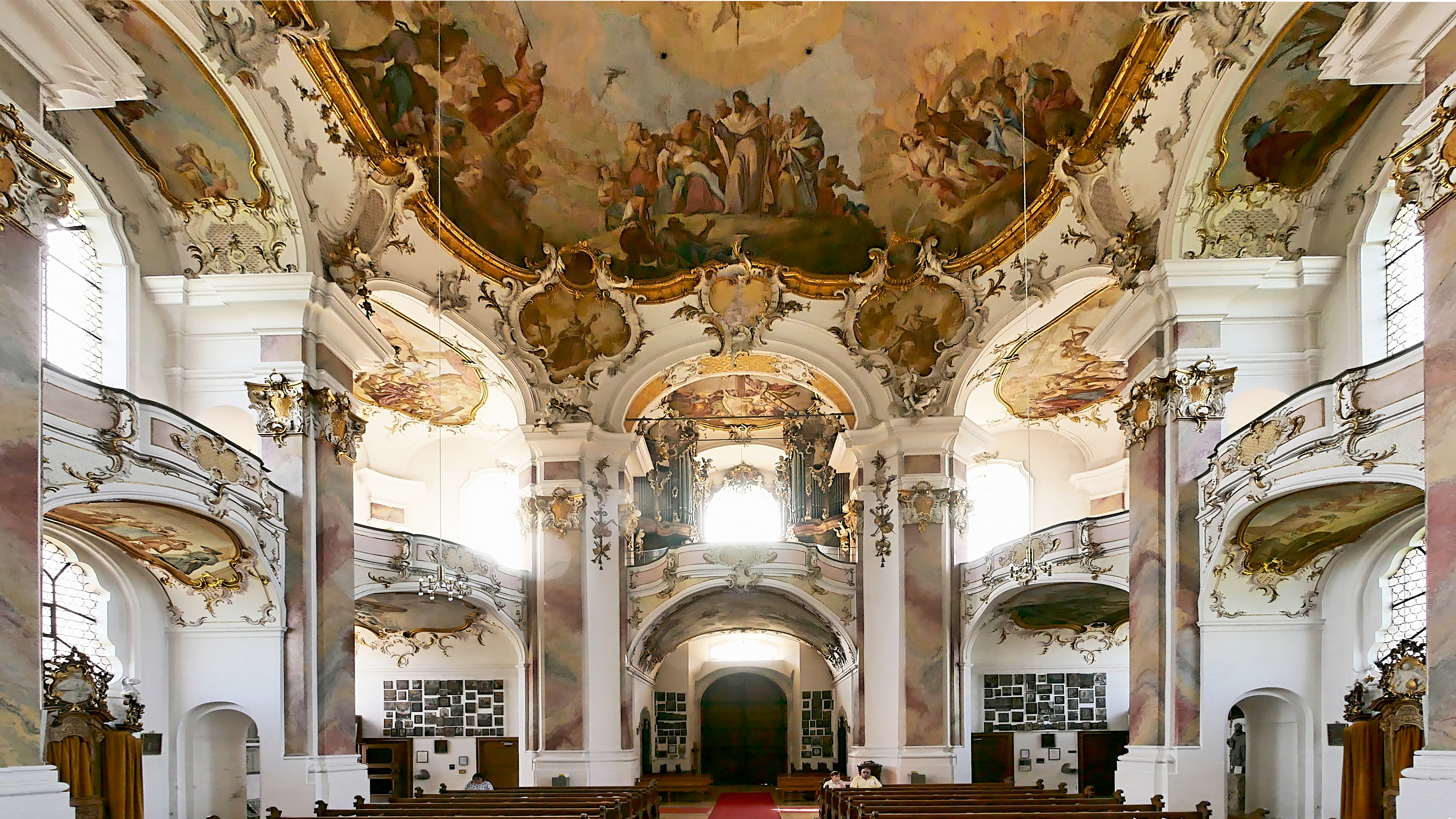 Wallfahrtskirche Maria Steinbach, Landkreis Unterallgäu (Bayern) Blick nach Westen zur Orgel